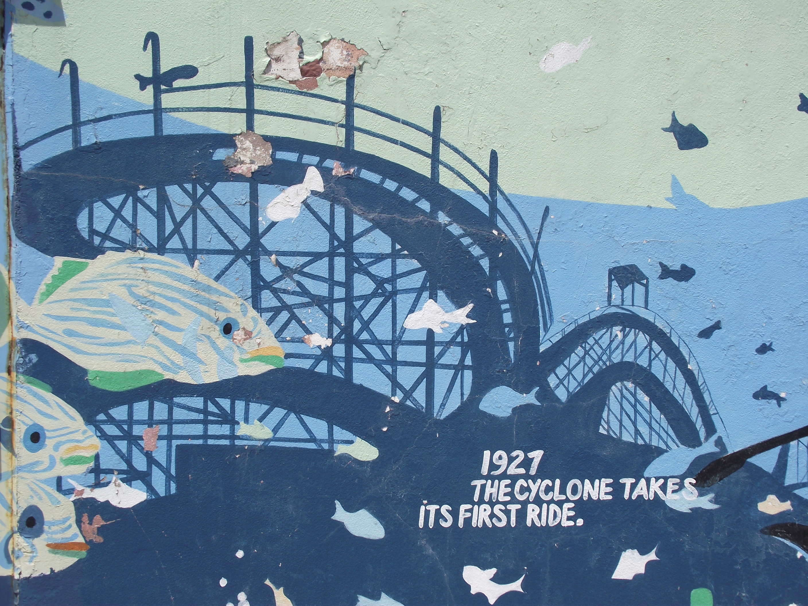 South wall New York Aquarium